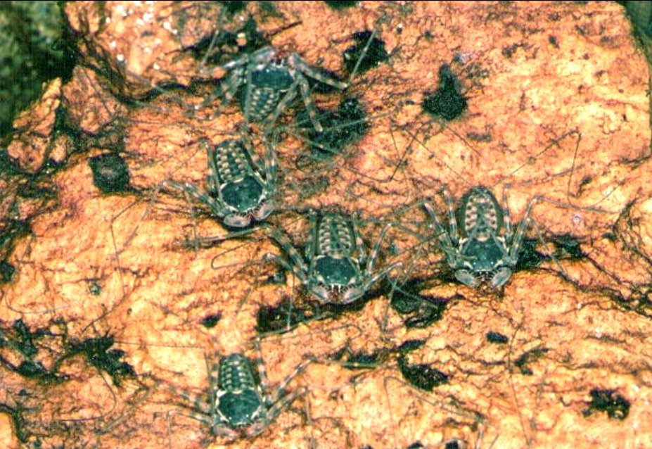 Amblypygi, Damon diadema.